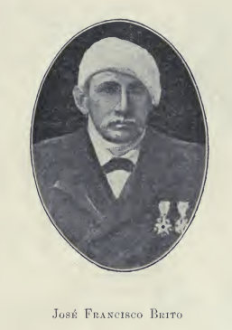 Buzo chileno en la GdP